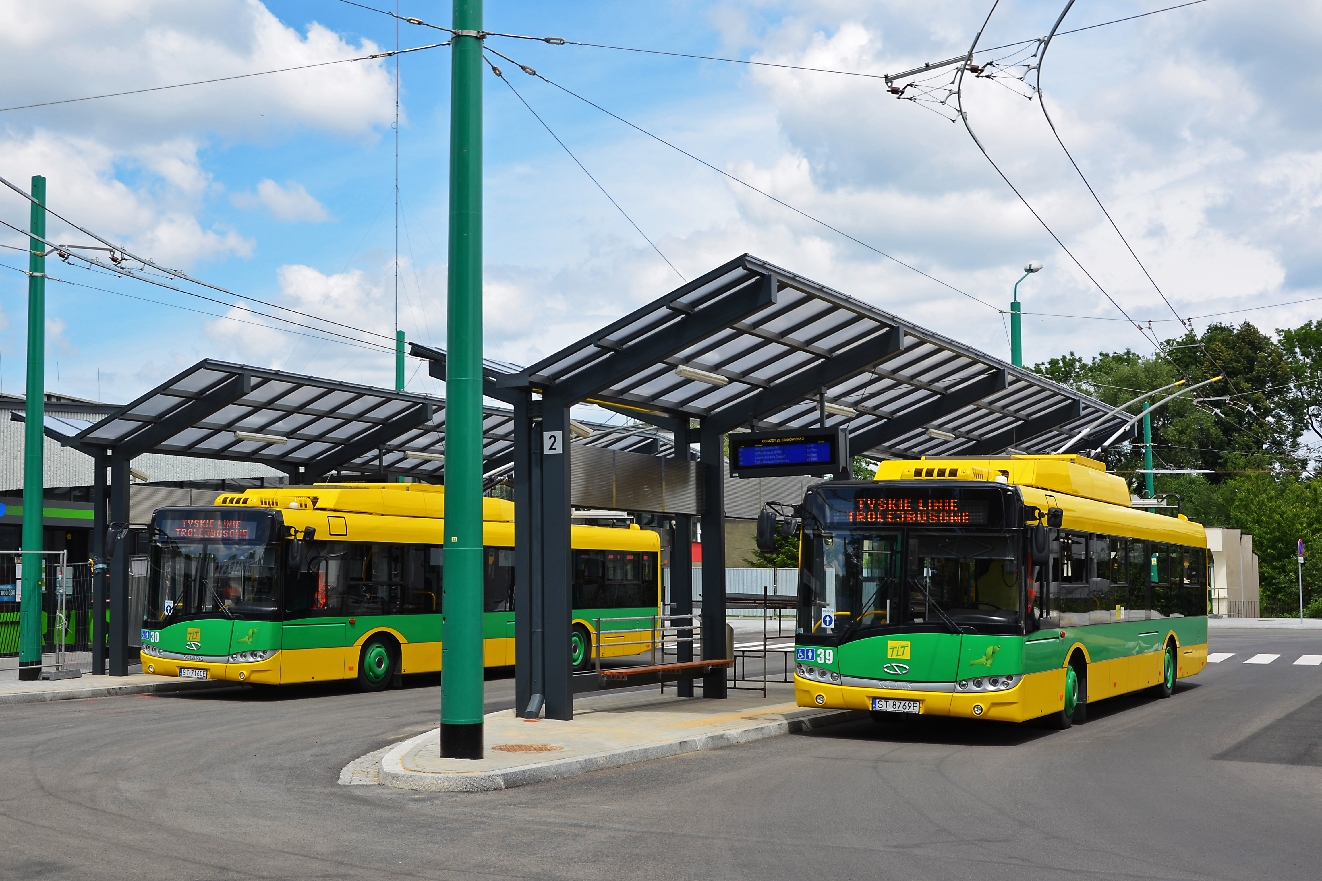 Dwa Solarisy Trollino 12MB na stanowiskach I i II Dworca PKP w Tychach.